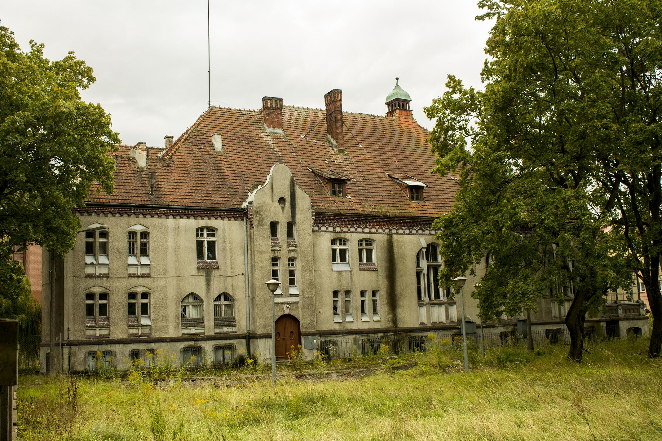 Gołdap, kasyno oficerskie, 1906-1910